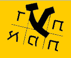 даат эмет зеркало